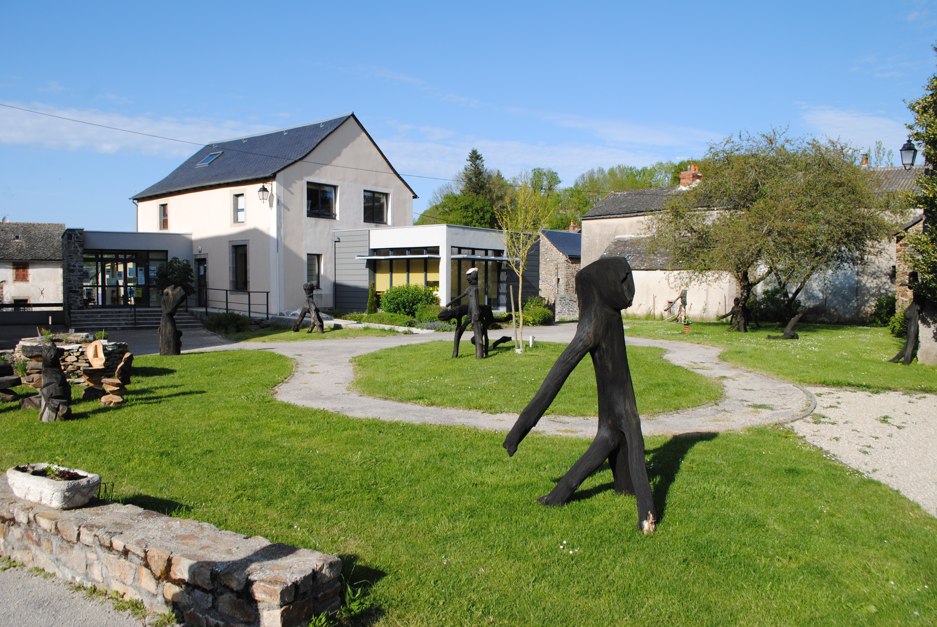 Pôle culturel Le Cantou (une médiathèque et une cyber-base) et le jardin du Cantou avec une exposition de sculpture en bois.